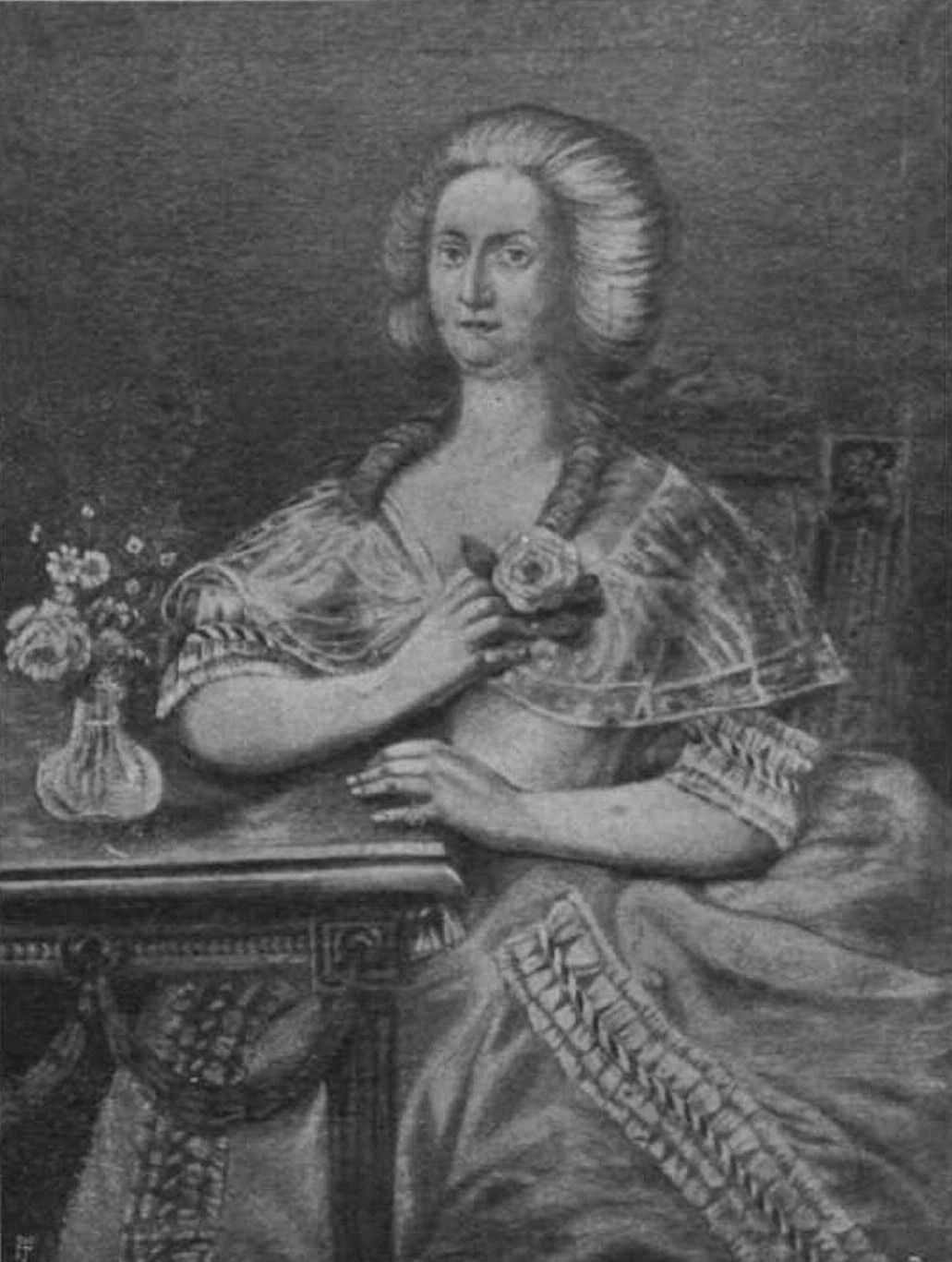 Deák Ferencné Sibrik Erzsébet, idősebb Deák Ferenc hitvese